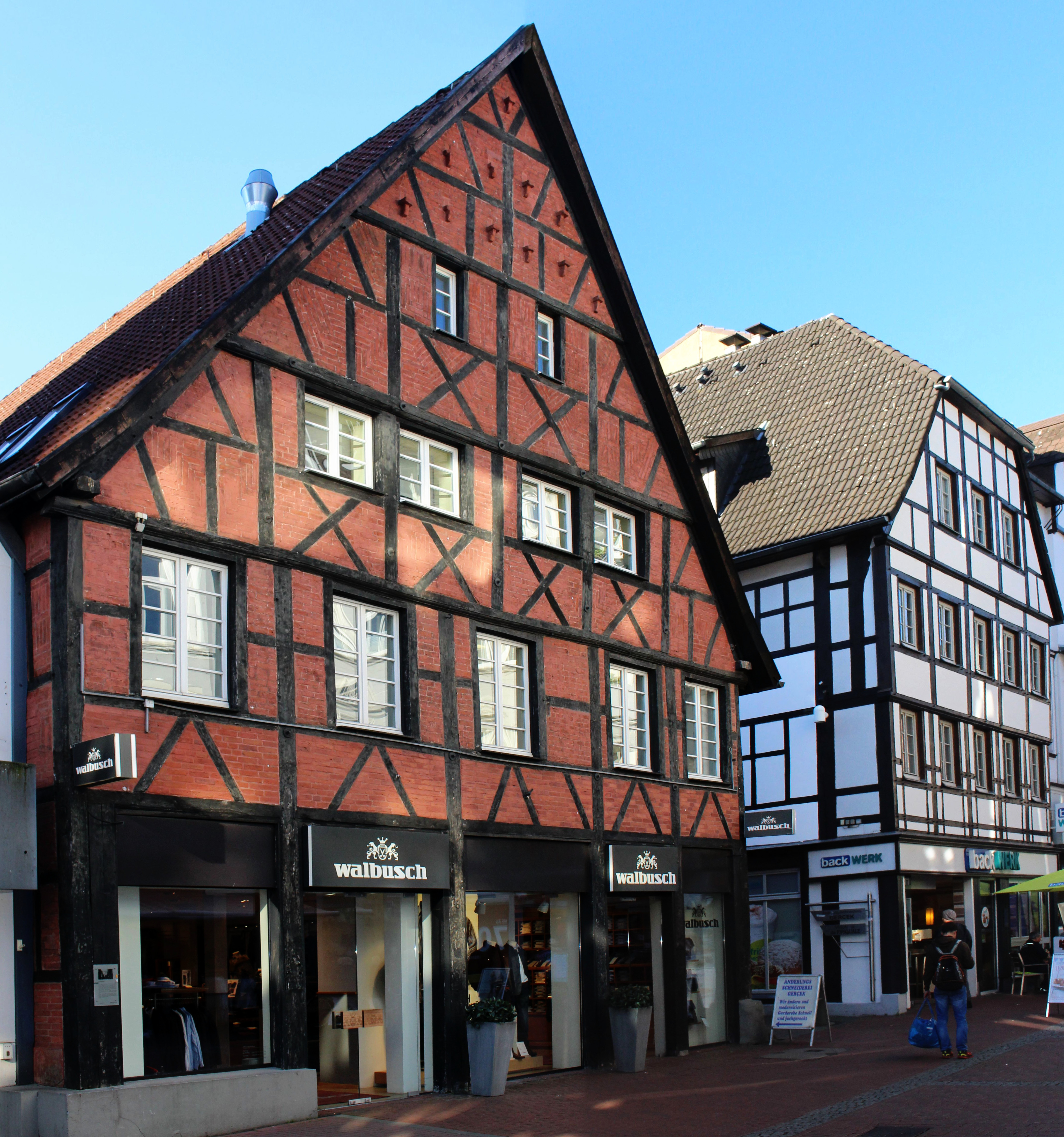 Kunibertistraße 16, Recklinghausen